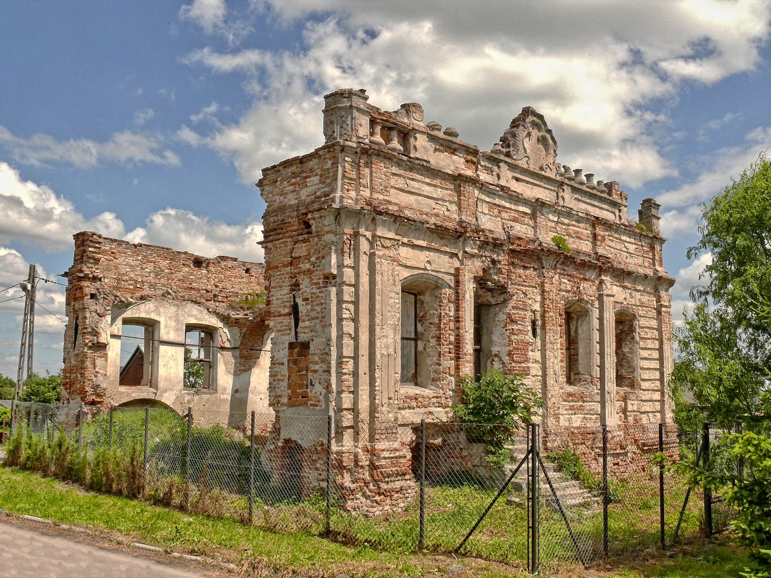 Łaszczów, ul. Lwowska 68 - ruiny synagogi przebudowanej z arsenału zamku rodziny Łaszczów.